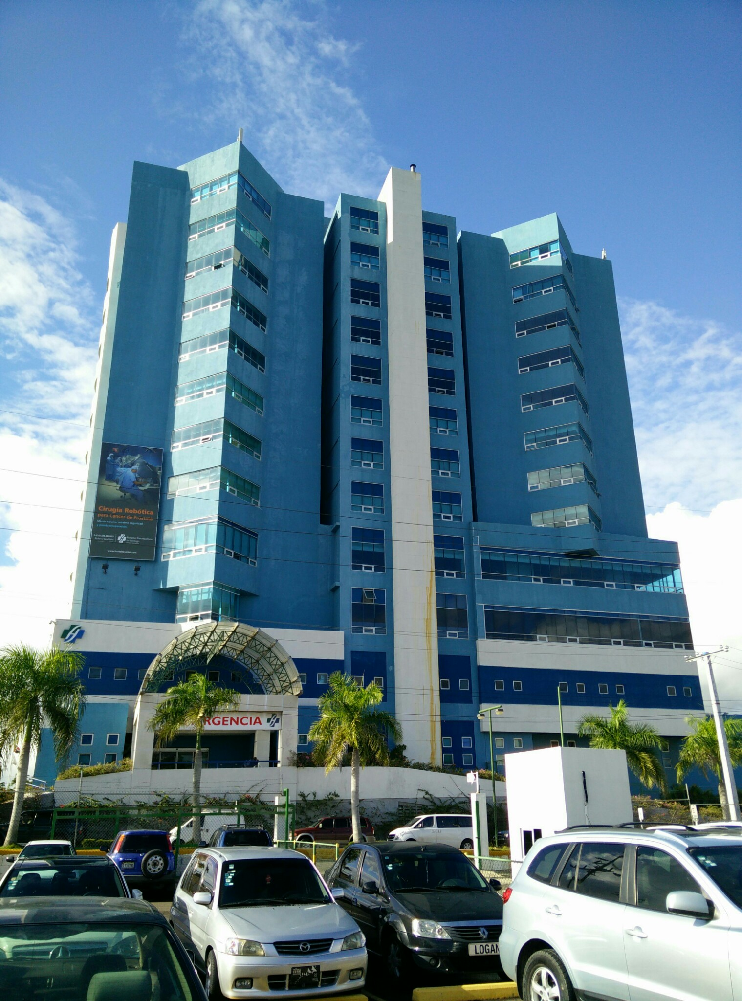 Hospital Metropolitan Santiago (HOMS)